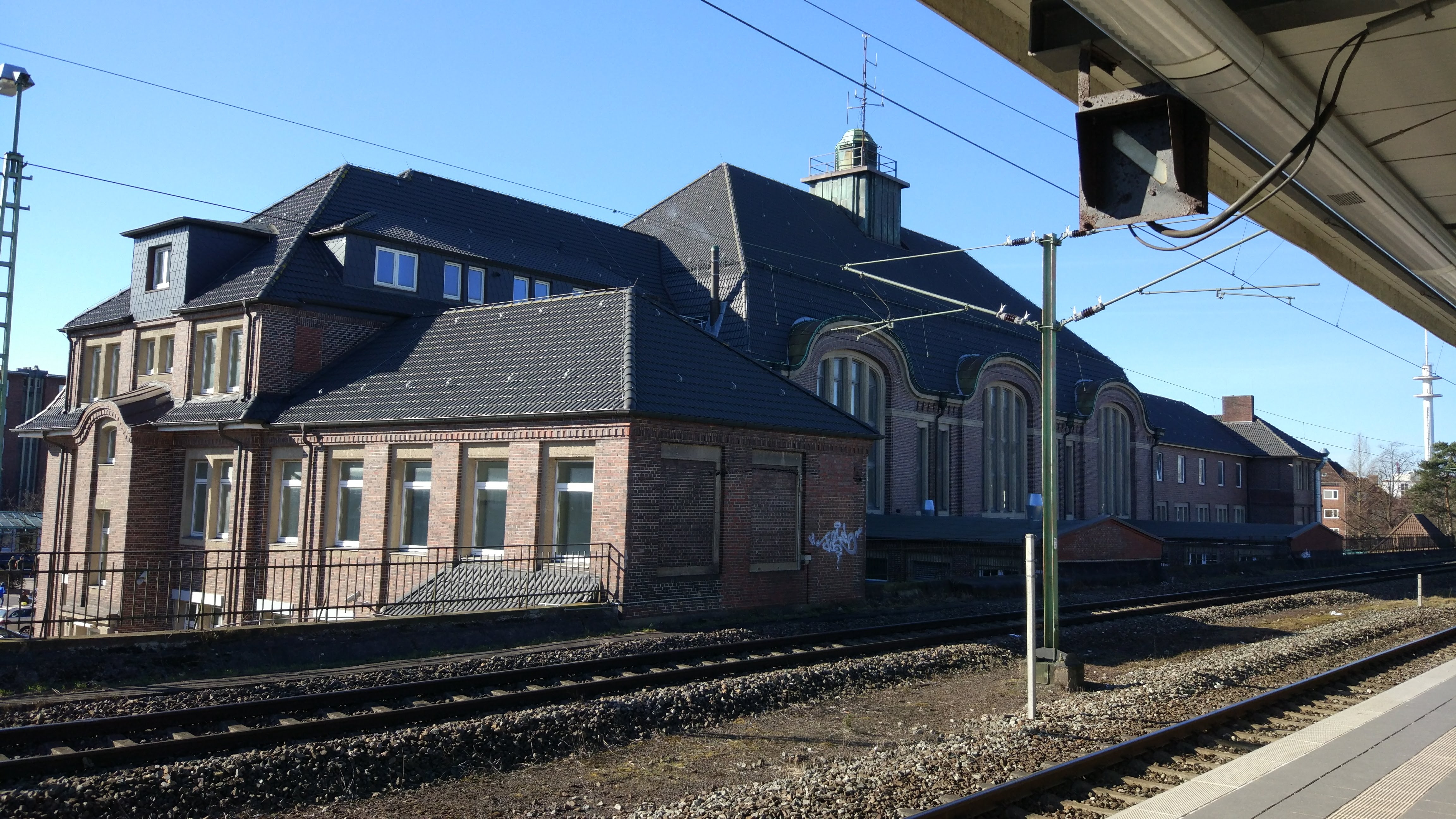 Bahnhof Bremerhaven Hauptbahnhof Blick von den Bahnsteigen auf das Bahnhofsgebäude.